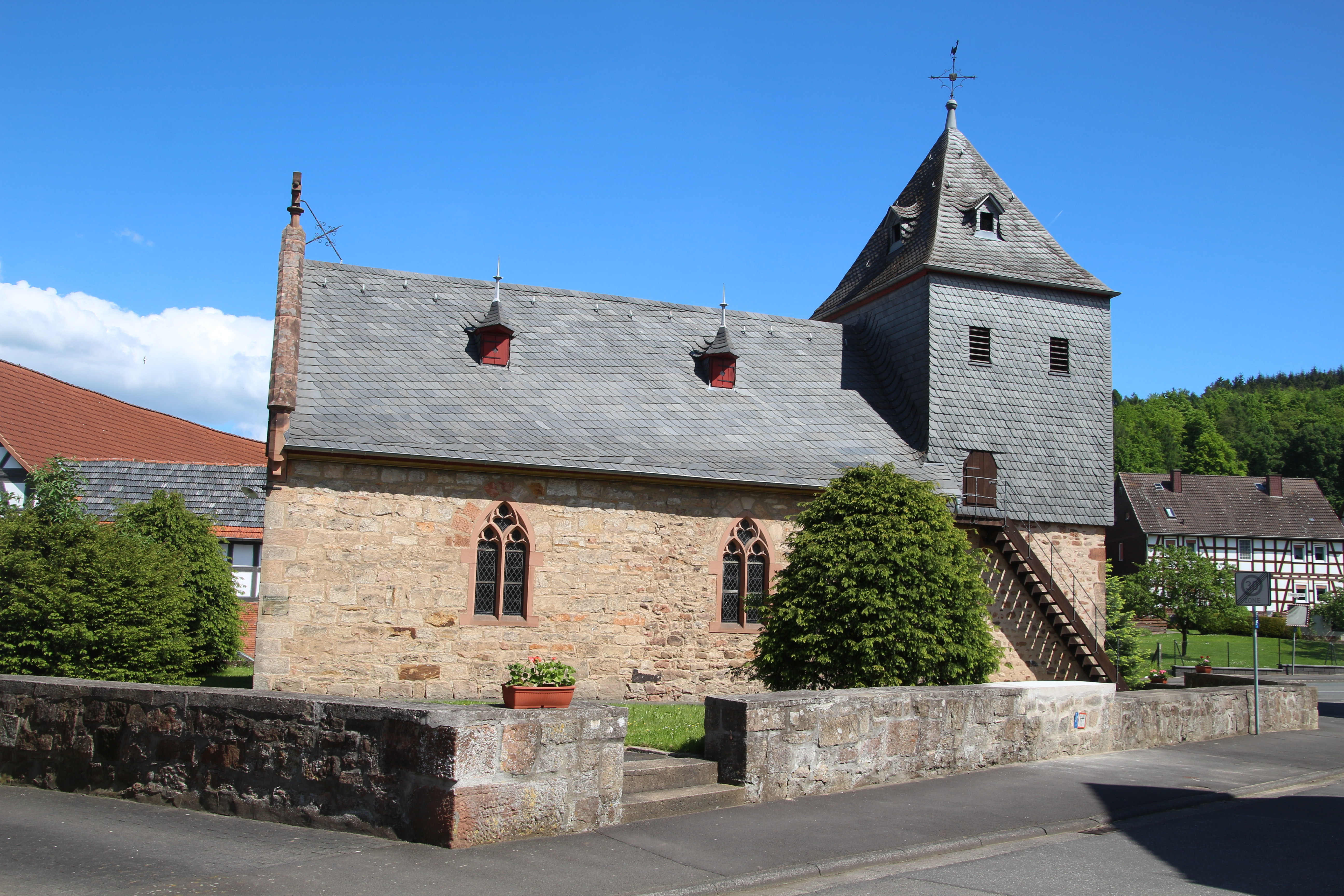 Siehe Bild und Dateiname